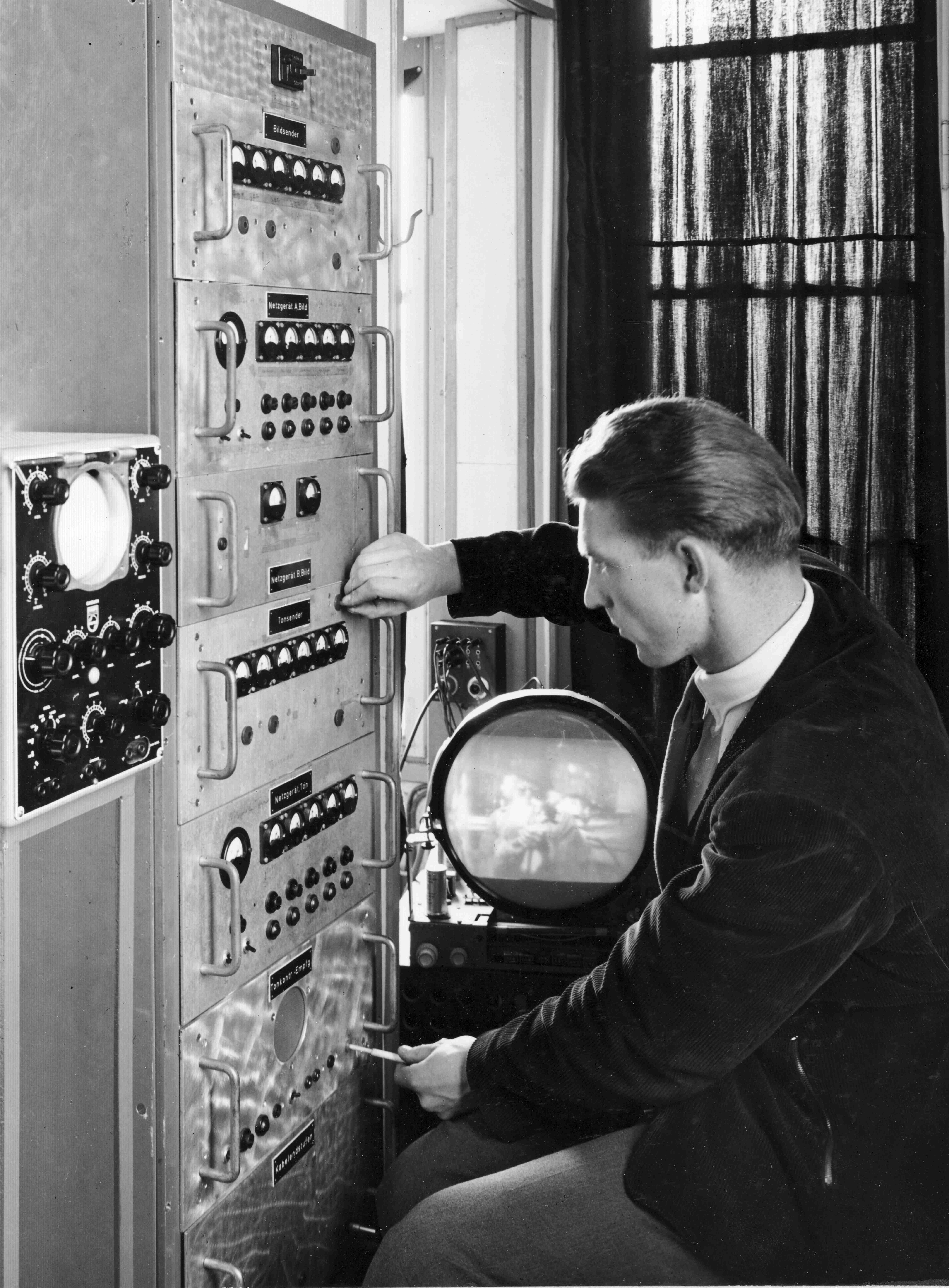 Walter Mayer am ersten süddeutschen Fernsehsender